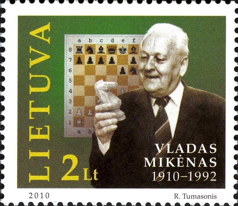 FIDE International Master - Vladas Mikenas (1910-1992)